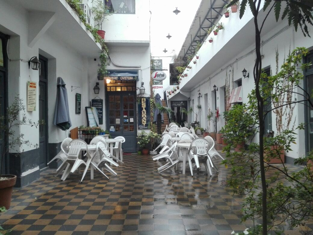 Galería del Viejo Hotel. Balcarce 1053, San Telmo, Buenos Aires.